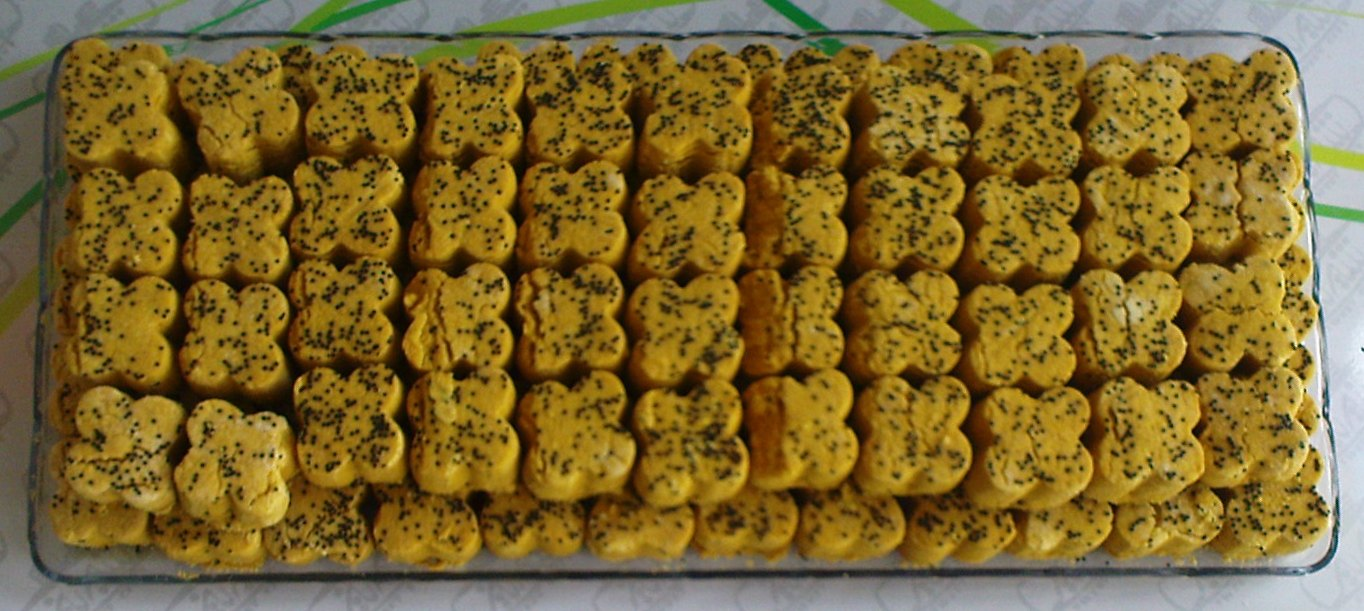 شیرینی نخودی